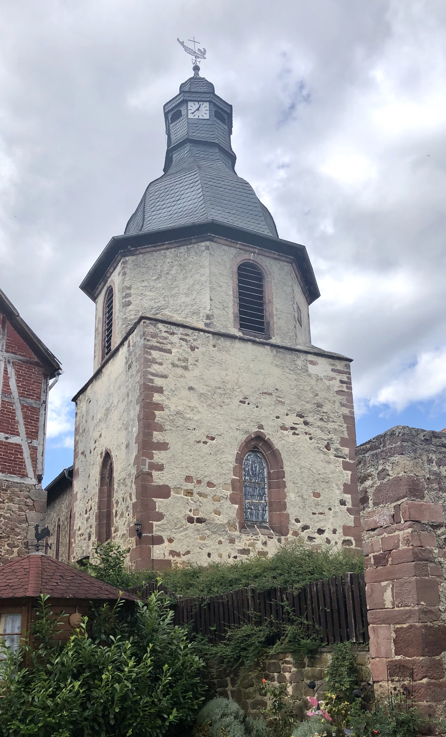 Kirchengebäude